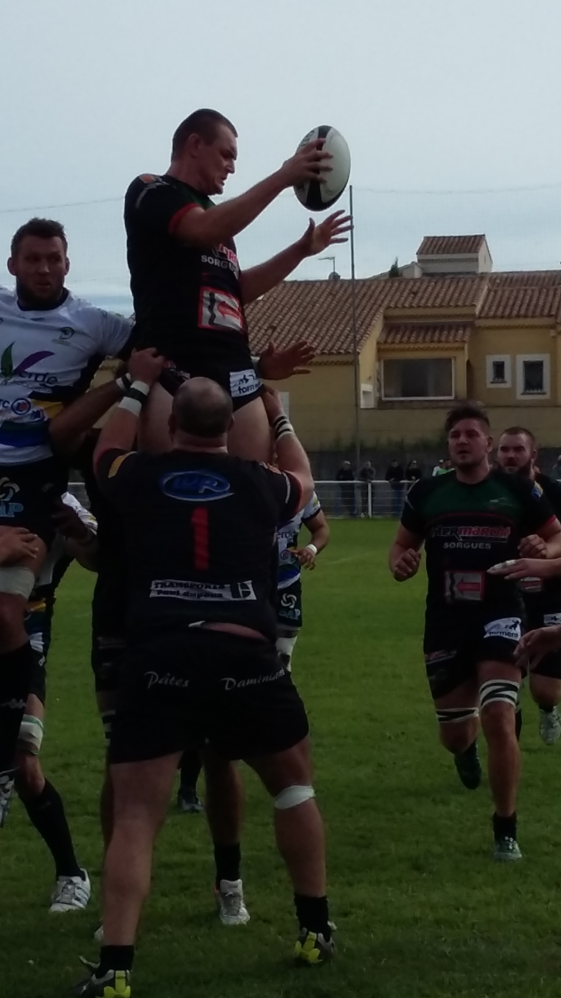 Match de rugby entre l'AS Bedarrides-Châteauneuf du Pape contre Hyères/Carqueiranne lors de la saison 2016/17